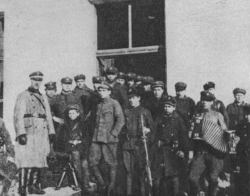 Pluton Stanisława Wolaka ze zdobytym karabinem maszynowym